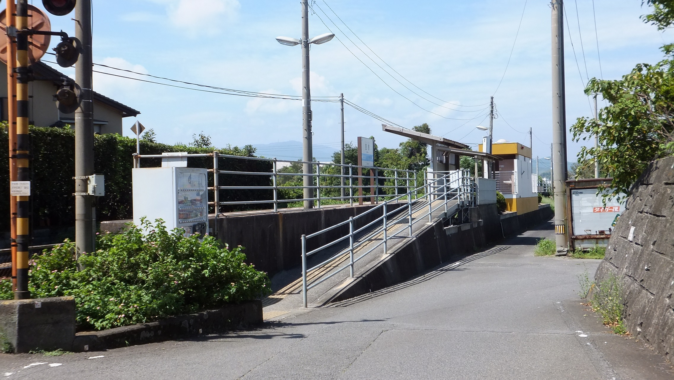 JR牟岐線 西原駅 （徳島県阿南市）